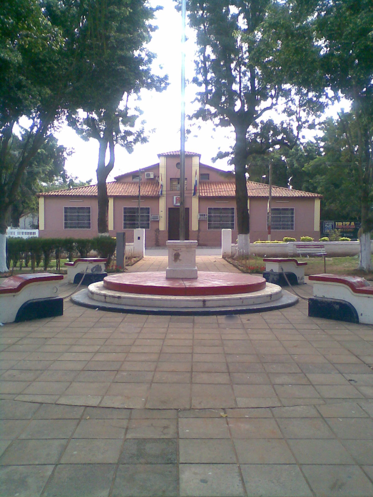 La plaza y la municipalidad